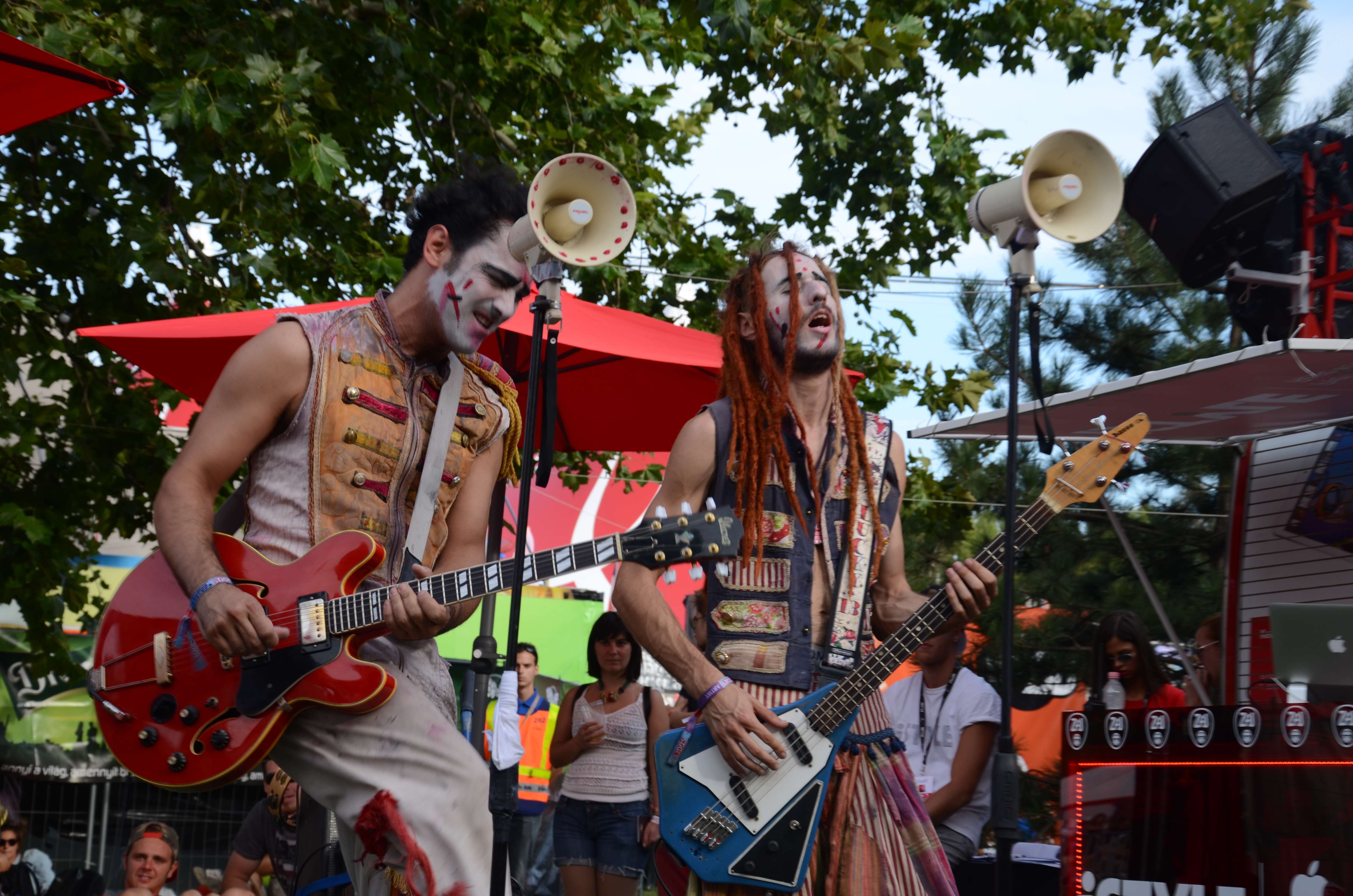 Szigetfestival 2014.